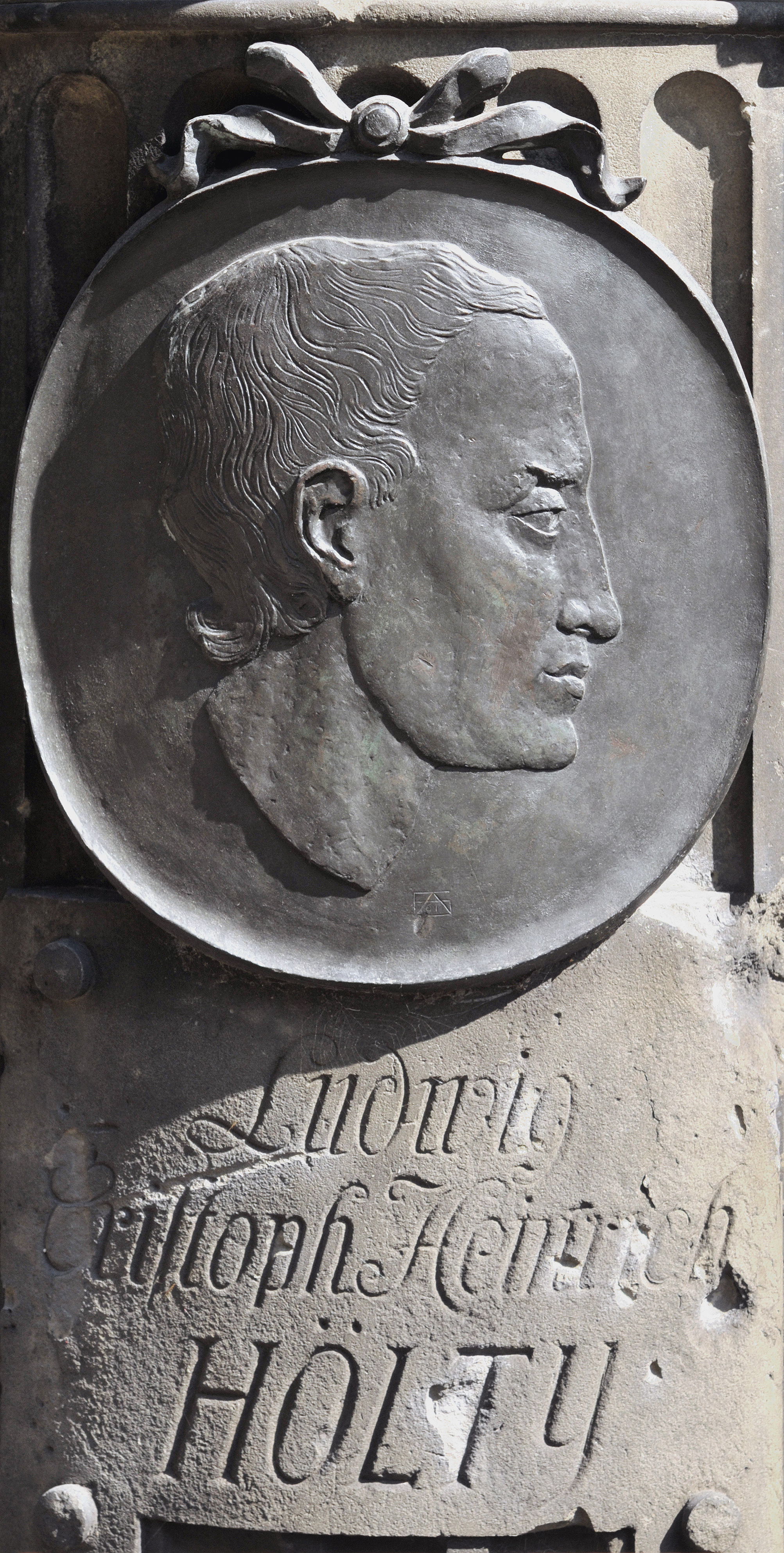 Portraitrelief des Ludwig Heinrich Christoph Hölty von Friedrich Adolf Sötebier aus dem Jahr 1961 an dem Gedenkmal von 1901 auf dem alten St.-Nikolai-Friedhof in Hannover. Die Signatur Friedrich Adolf Sötebier auf dem Portraitrelief ist zusammengesetzt aus den Versalien des Namens Friedrich Adolf Sötebier (F A S) und der Jahreszahl 61 (für 1961). Das Gedenkmal wurde 1901 zur Erinnerung an den Dichter Ludwig Christoph Heinrich Hölty auf dem St. Nikolai-Friedhof von Otto Lüer und Karl Gundelach geschaffen, das Porträt-Medaillon von Friedrich Adolf Sötebier wurde in dem Jahr 1961 über der alten Inschrift eingefügt. Rechts davon steht die Bronzefigur eines Jünglings, die entweder von Karl Gundelach oder von Friedrich Adolf Sötebier geschaffen wurde.